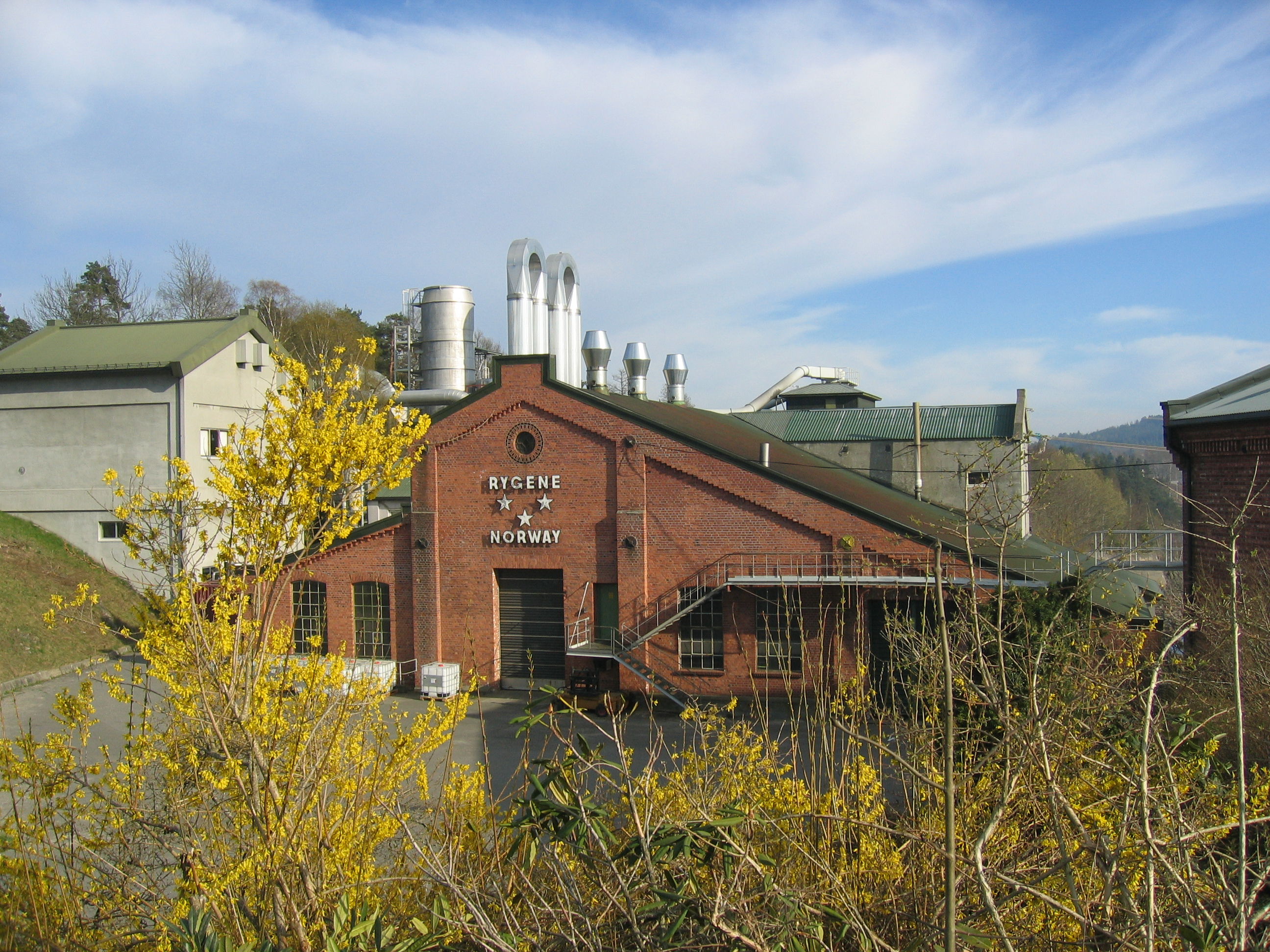 Arendal, Rykene Rygene, factory